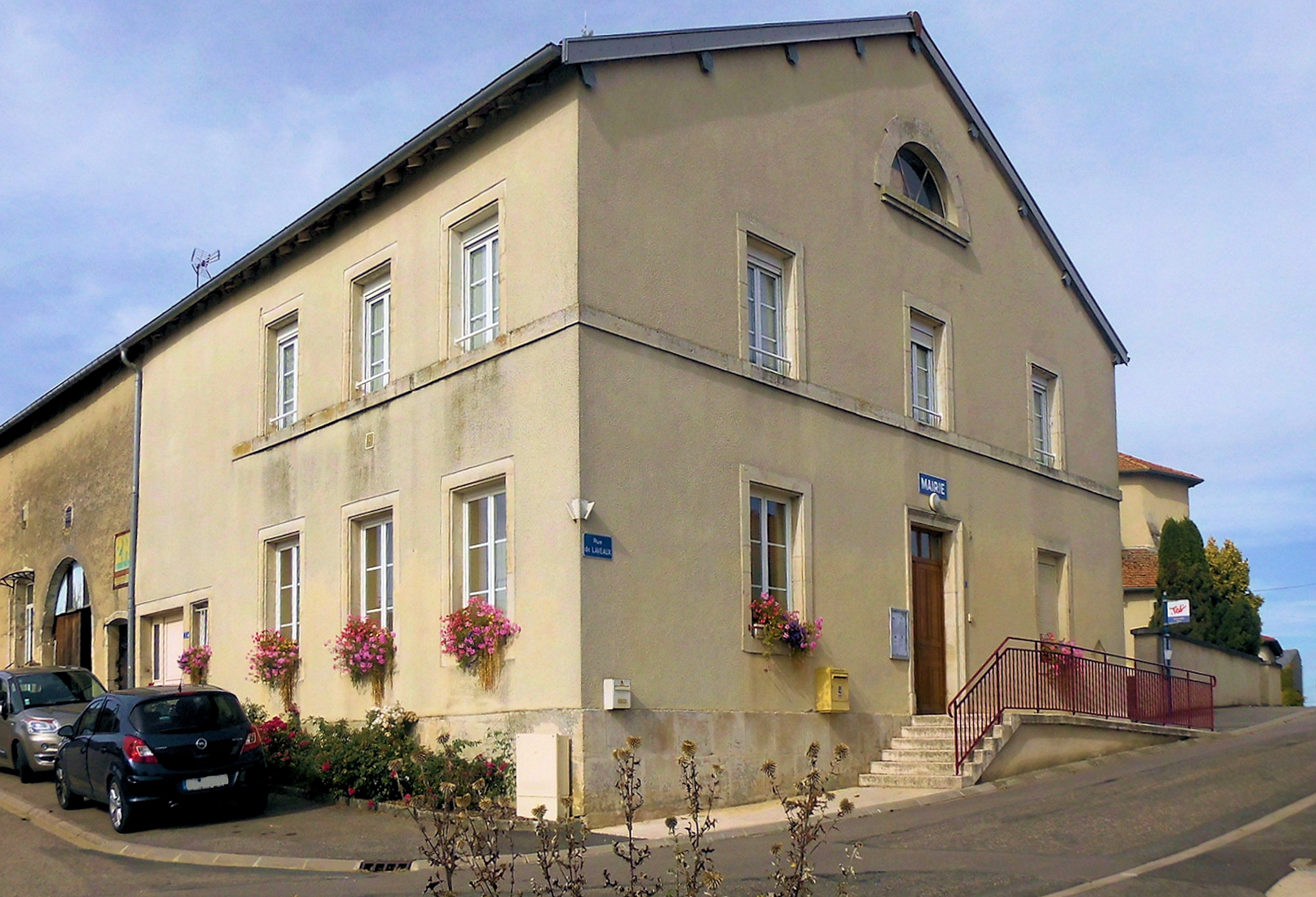 La mairie d'Harmonville